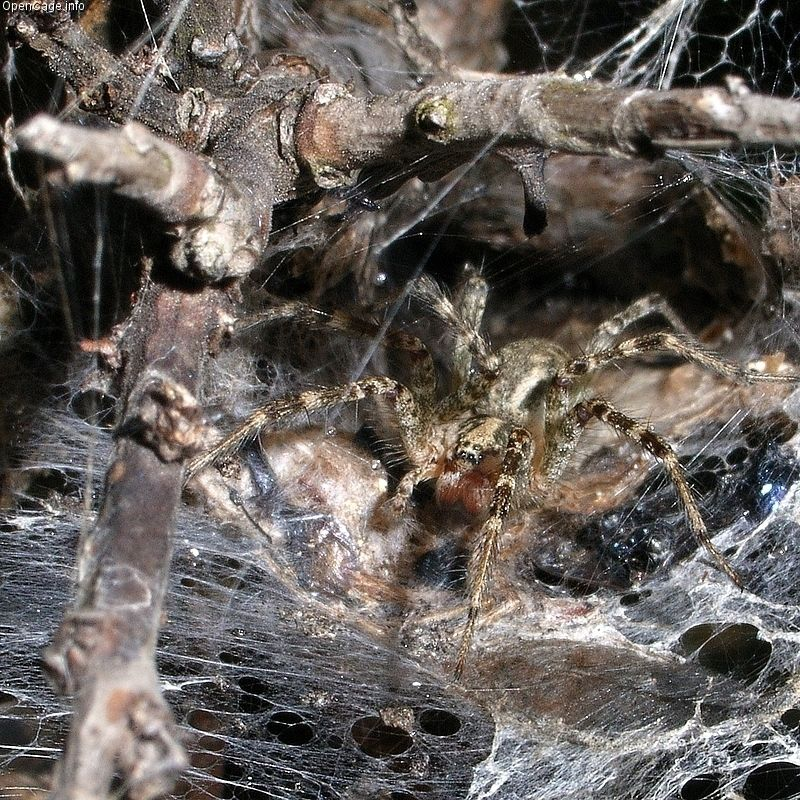 コクサグモ (Agelena limbata Araneomorph funnel-web spider)